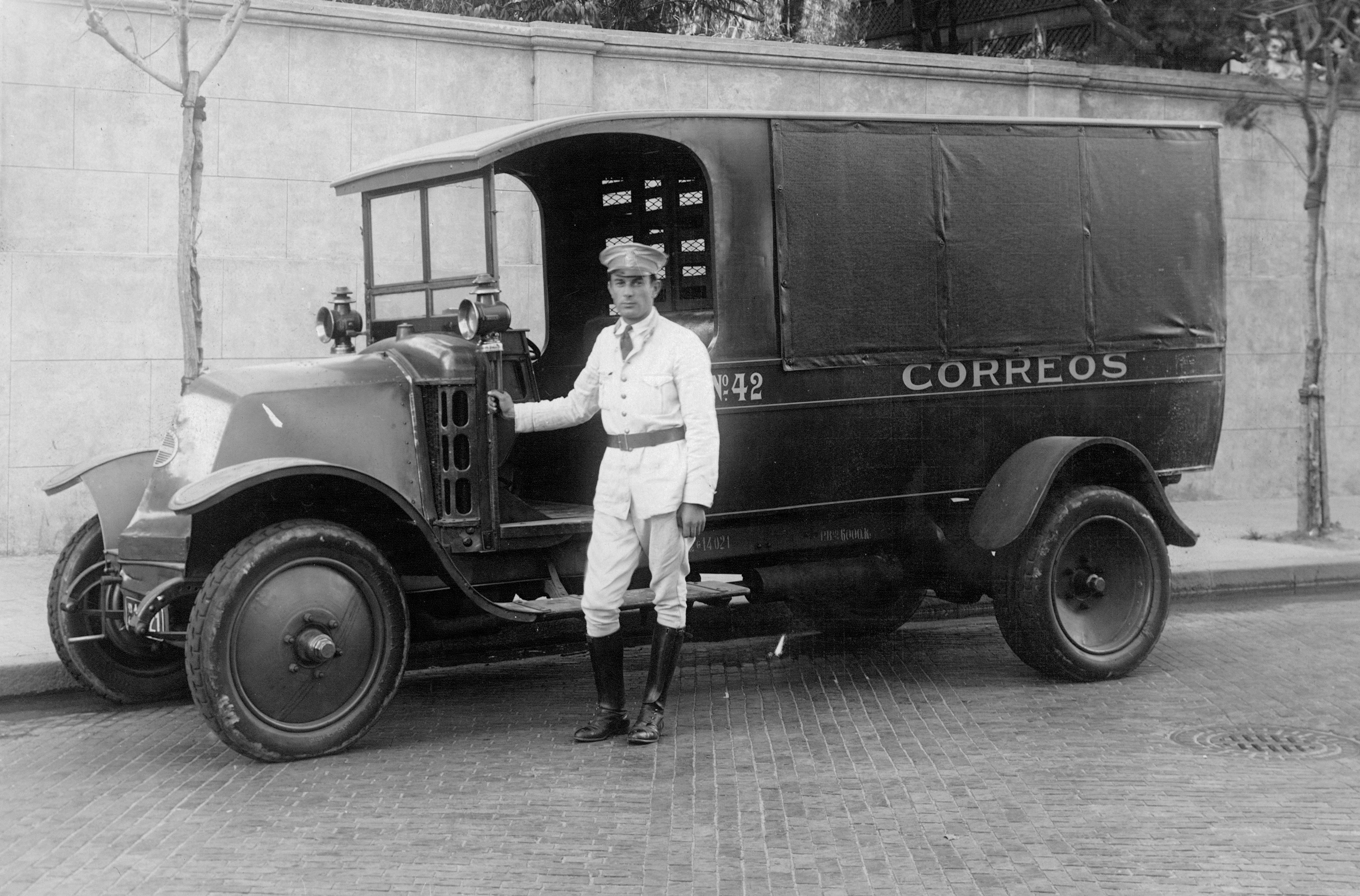 Automóvil utilizado en la distribución de encomiendas a domicilio, principios del siglo XX. Inventario AGN 12807.